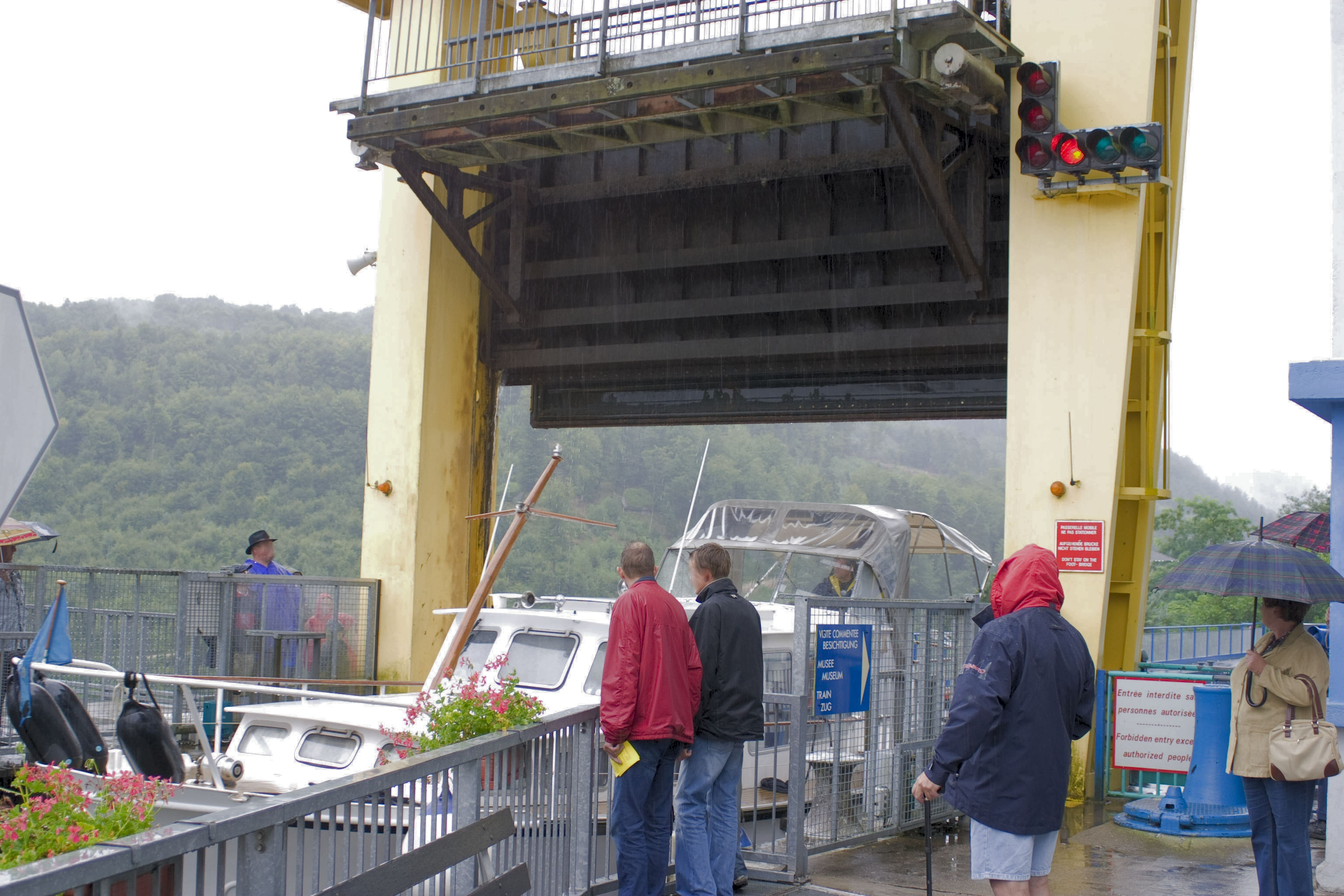 porte du plan incliné de Arzviller